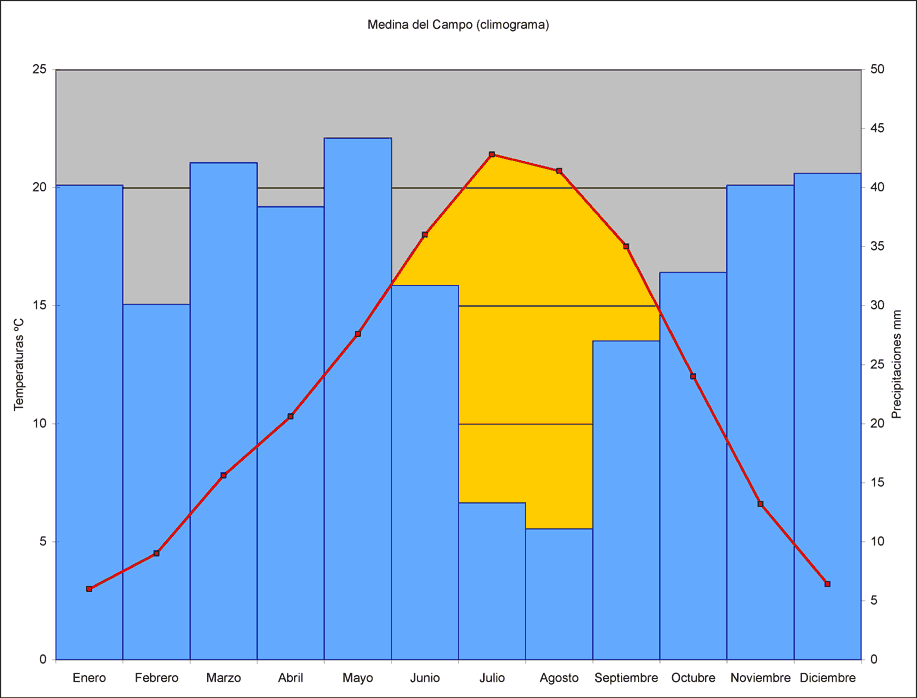 Climograma: diagrama termopluviométrico de Medina del Campo (Valladolid, España) Temperatura media anual: 11,6ºC Oscilación térmica anual: 18,4ºC Precipitación total anual: 392 mm/m² Meses de sequía: Junio, Julio, Agosto y Septiembre Meses con temperaturas medias bajo 0ºC: ninguno Clima: MEDITERRÁNEO CONTINENTALIZADO SITUACIÓN: Latitud 41° 18' N - Longitud 4° 55' W - Altitud 721 metros sobre el nivel del mar